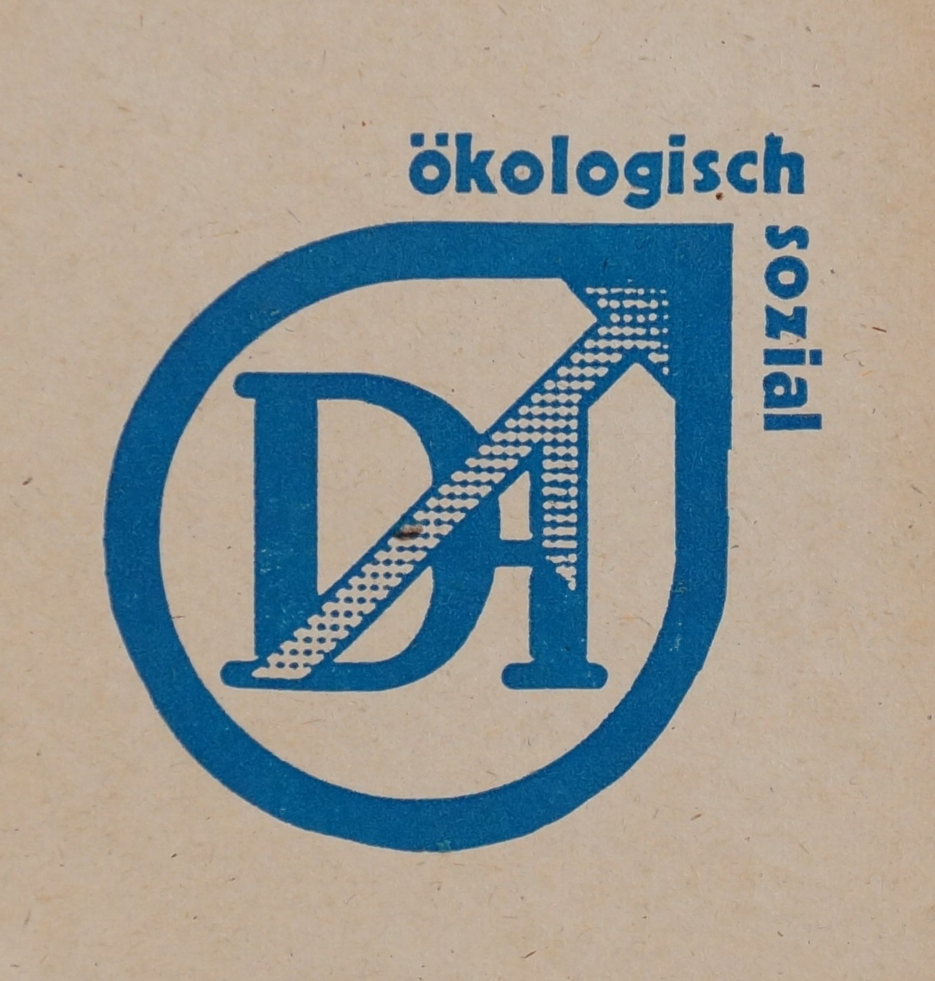 Diese Datei ist eine Aufnahme eines Aufklebers aus 1989/90 in Verbindung mit dem DA (Demokratischer Aufbruch). Das Motiv ist gemeinfrei.